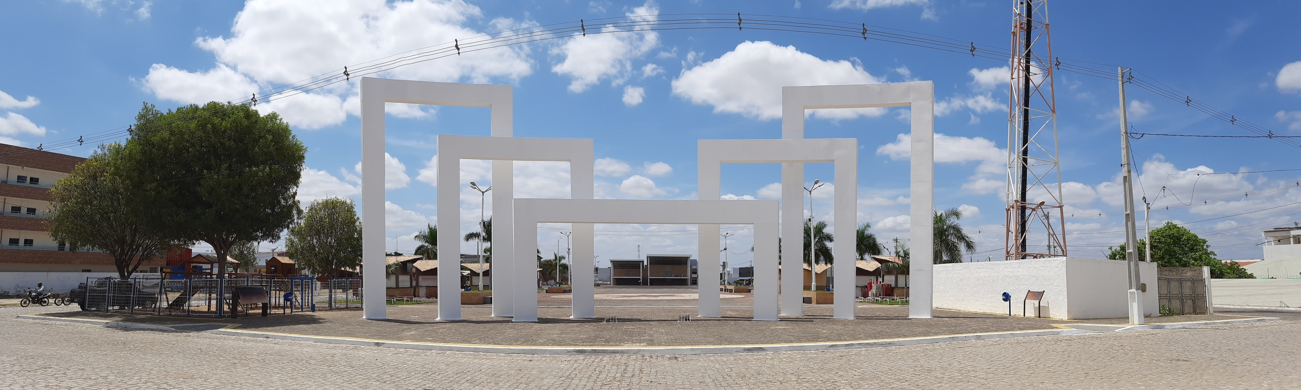 Praça de Eventos Nossa Senhora da Conceição, área de lazer pública e principal palco de eventos culturais de Pau dos Ferros, Rio Grande do Norte (Brasil).